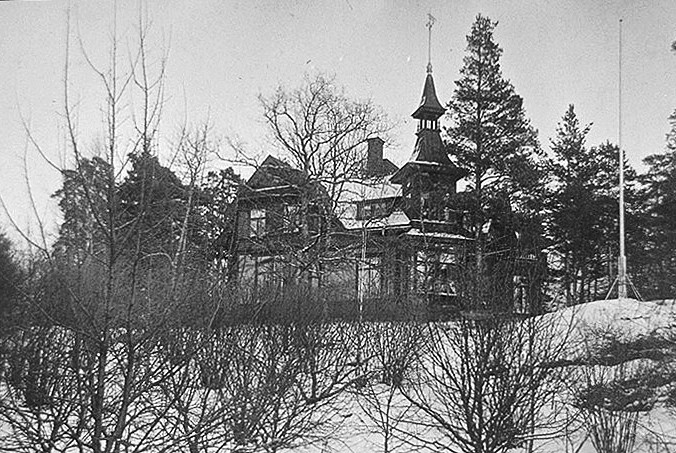 Sjuvilla nr 1 (längst fram) på ett vykort från 1900, villan revs 1965